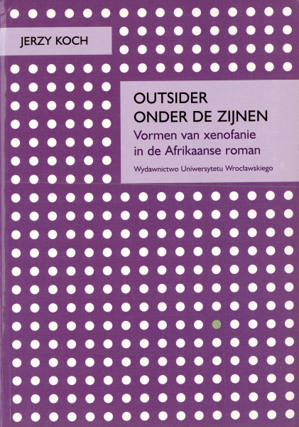 Outsider onder de zijnen (2002, Outsider wśród swoich)